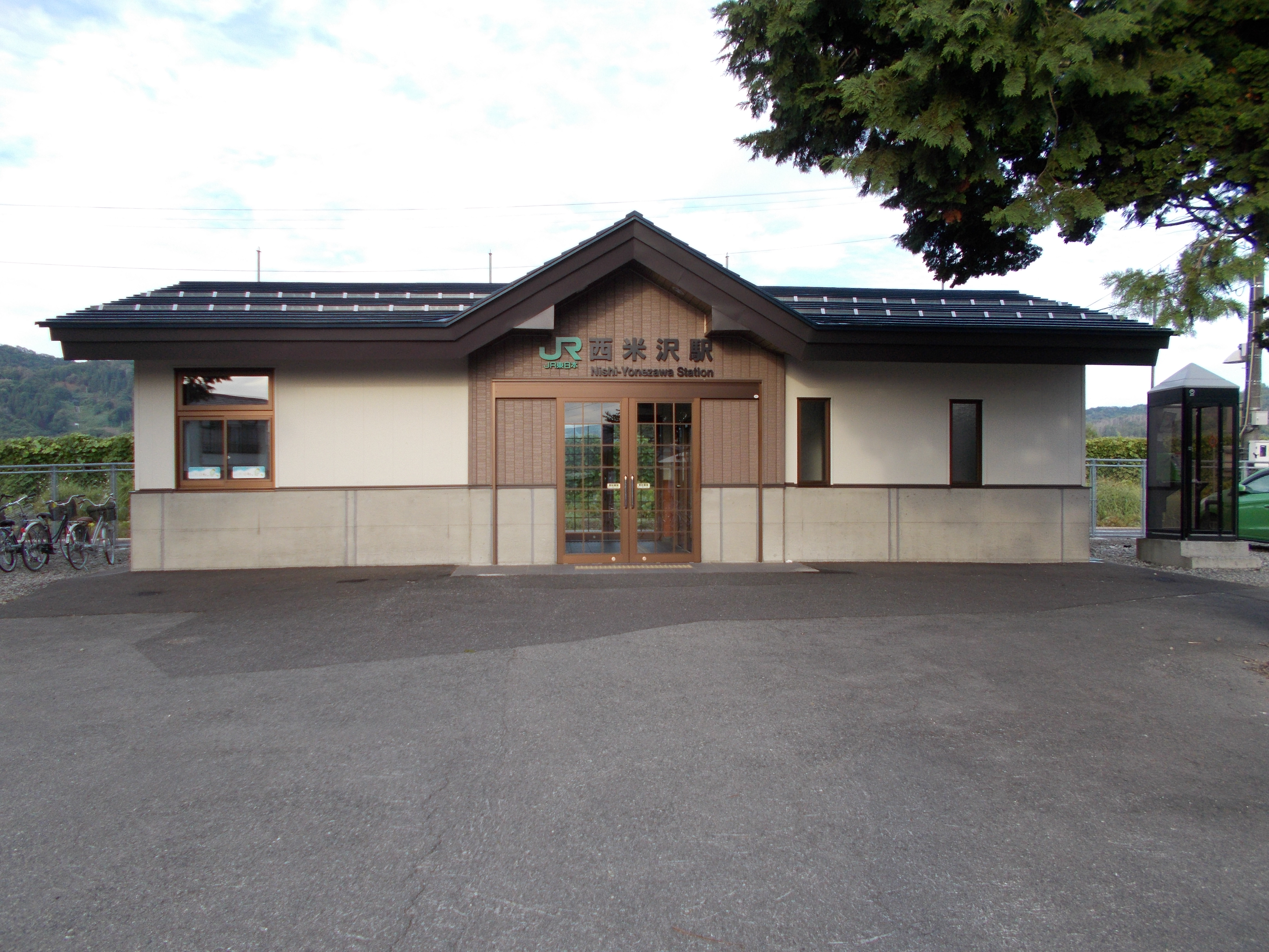 西米沢駅 駅舎